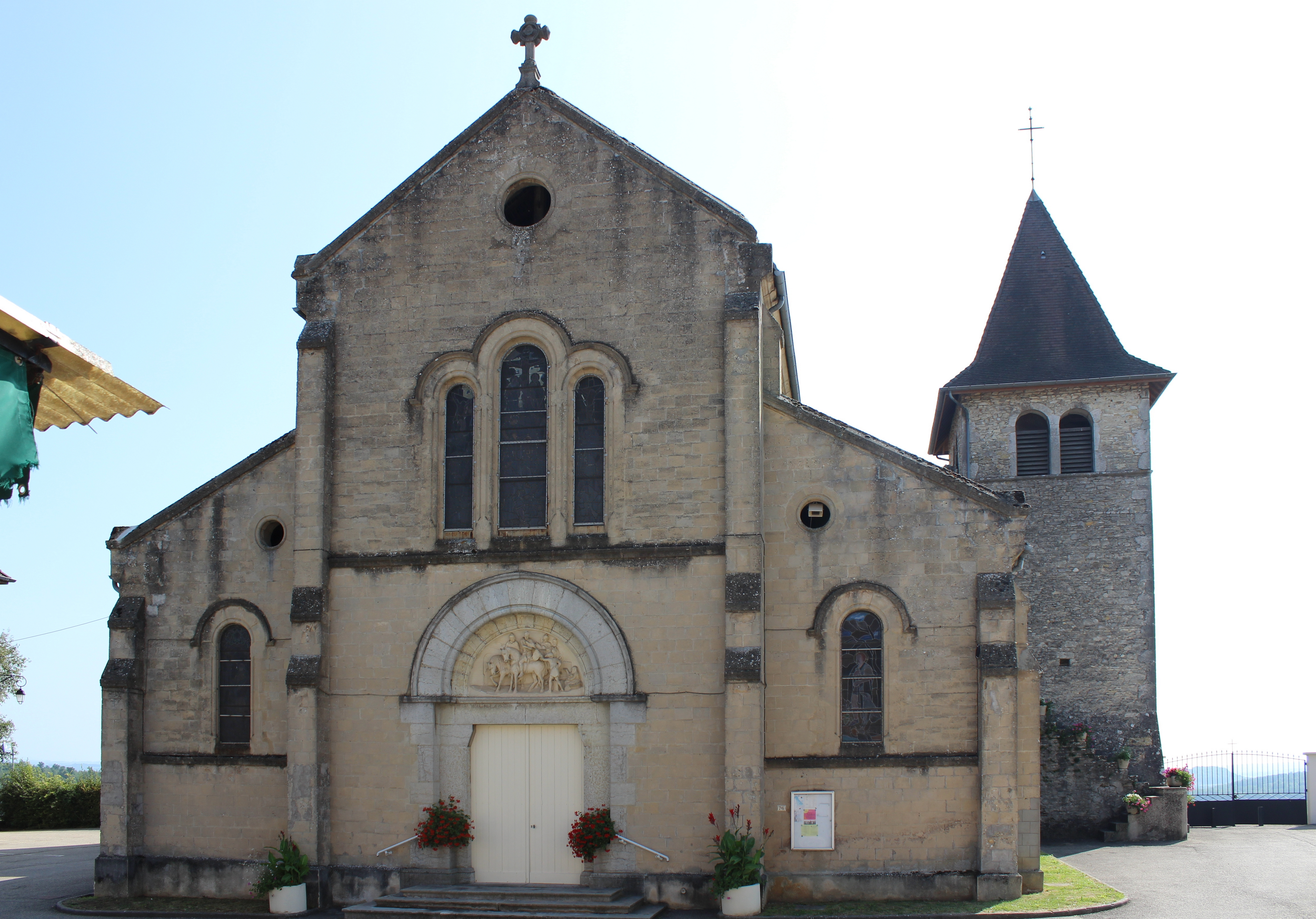 Façade de l'église de Courtenay (Isère).